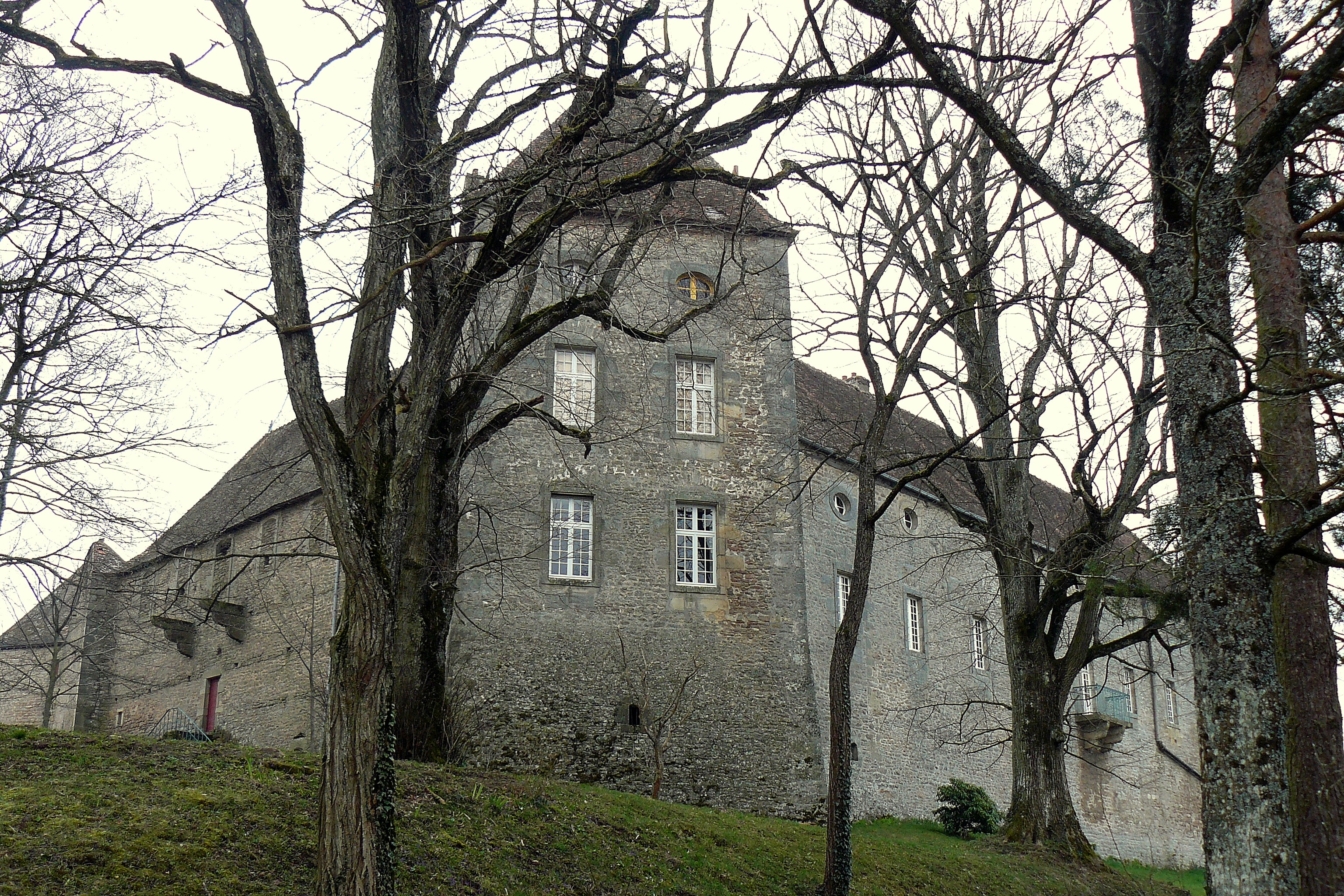 Le château de Brandon (Saône-et-Loire, France)